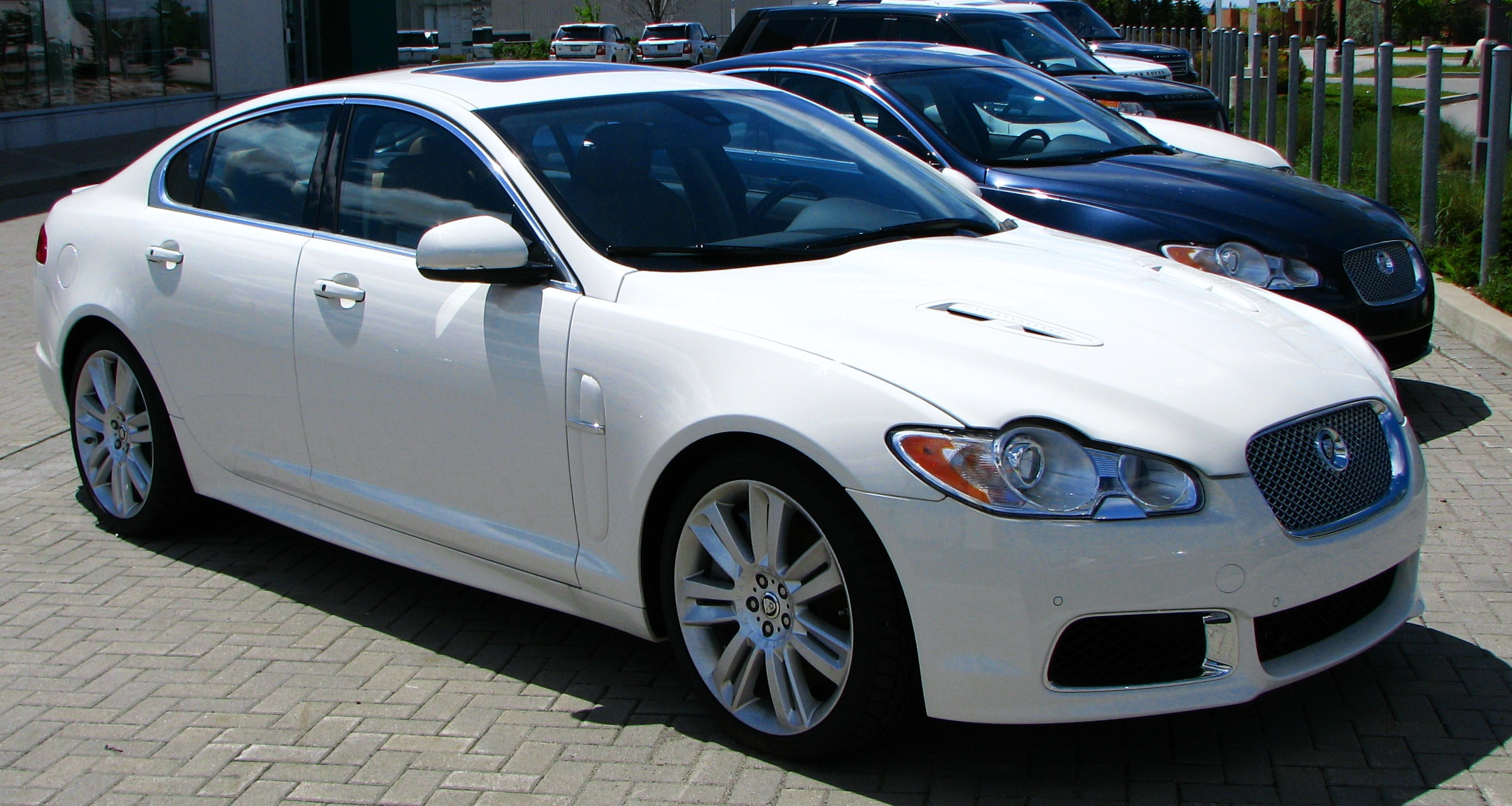 Jaguar XFR